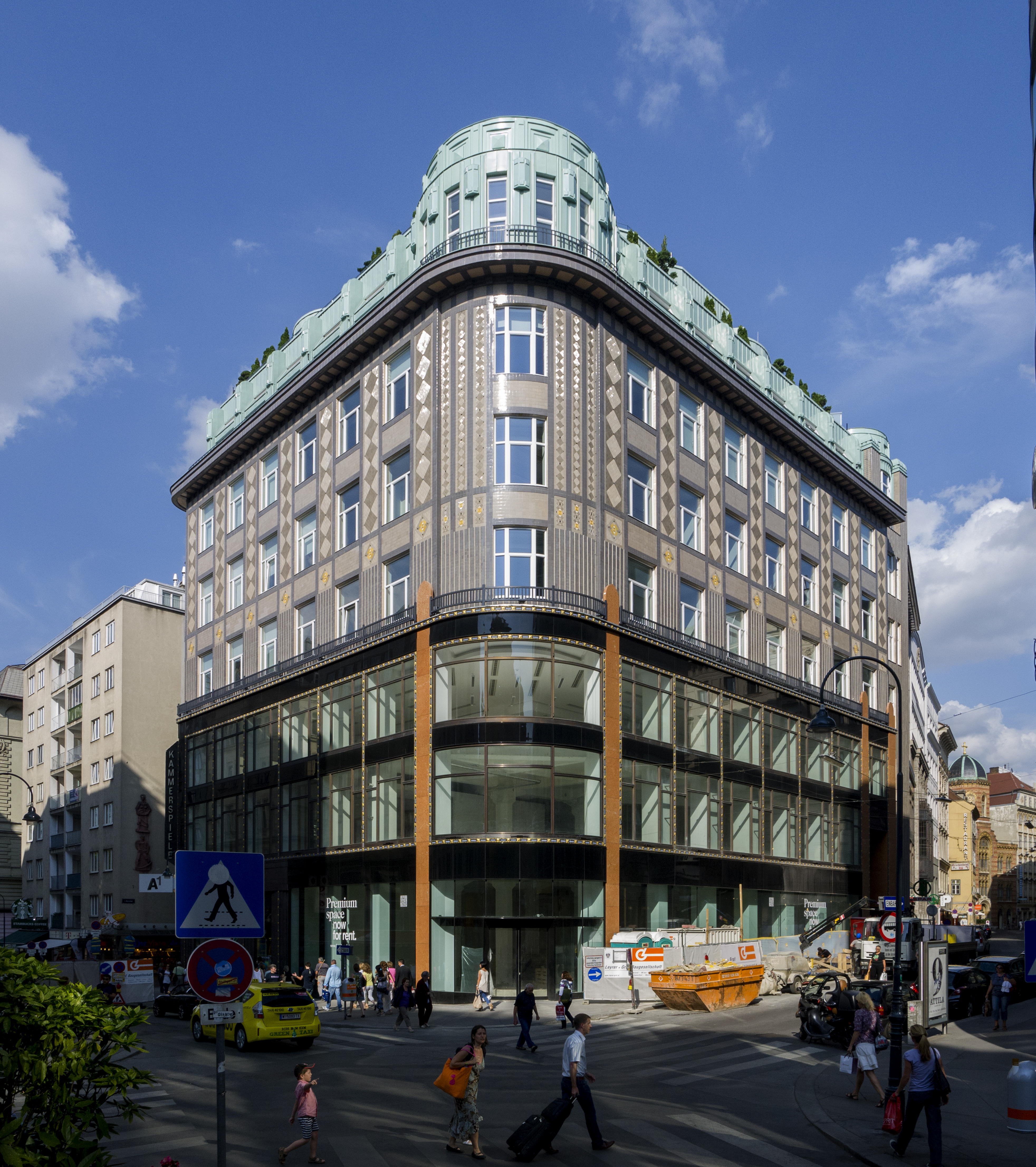 Orendihof, Reinerhof